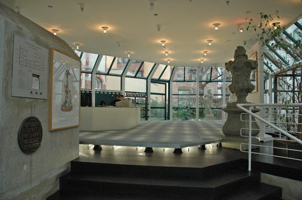 Vue de l'exposition On-Off Saarland Museum, Sarrebruck (décembre 2006)